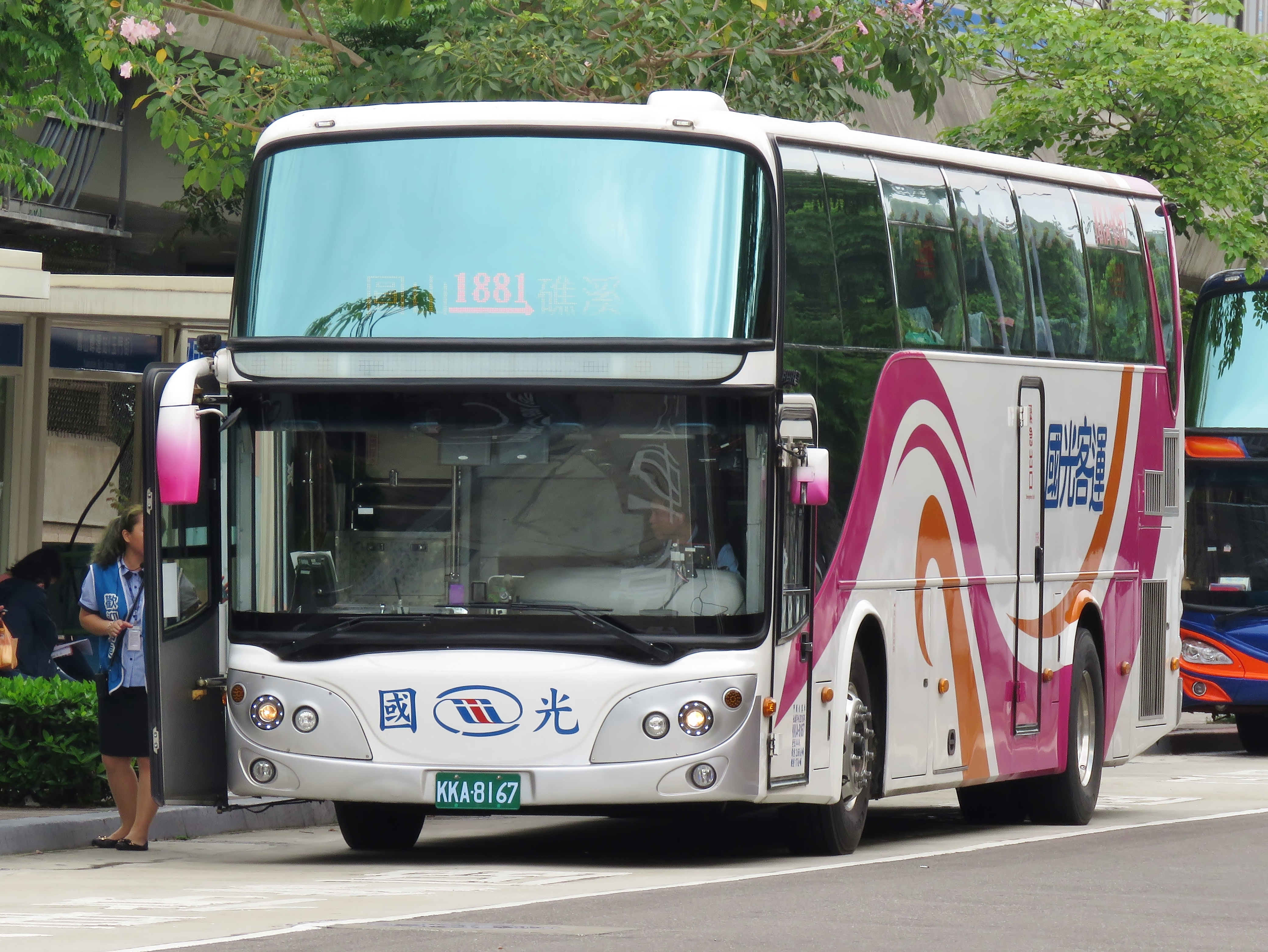 國光客運大宇TX4312大客車KKA-8167行駛1881路 圓山→礁溪 圓山轉運站(玉門)